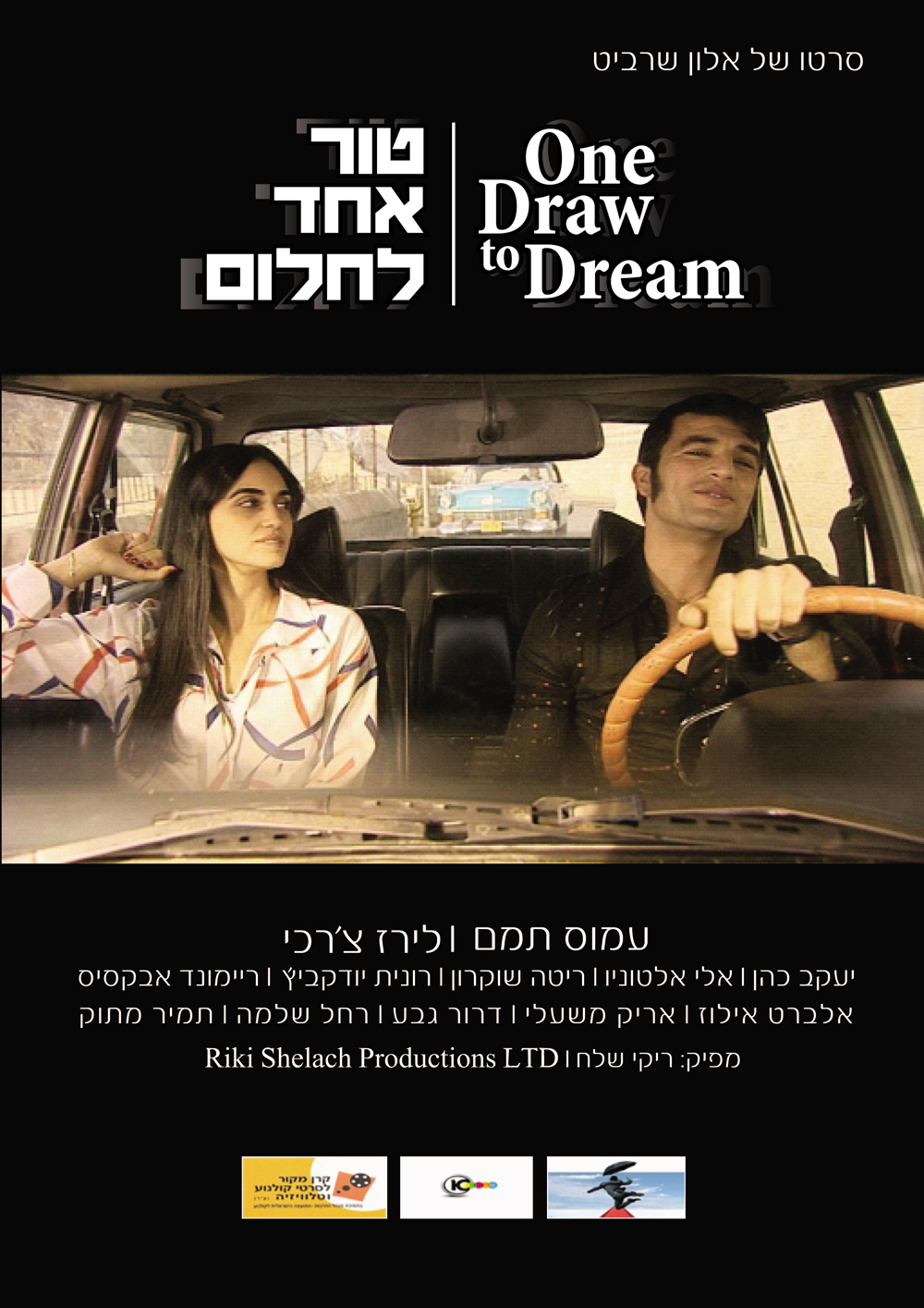 כרזת הסרט טור אחד לחלום